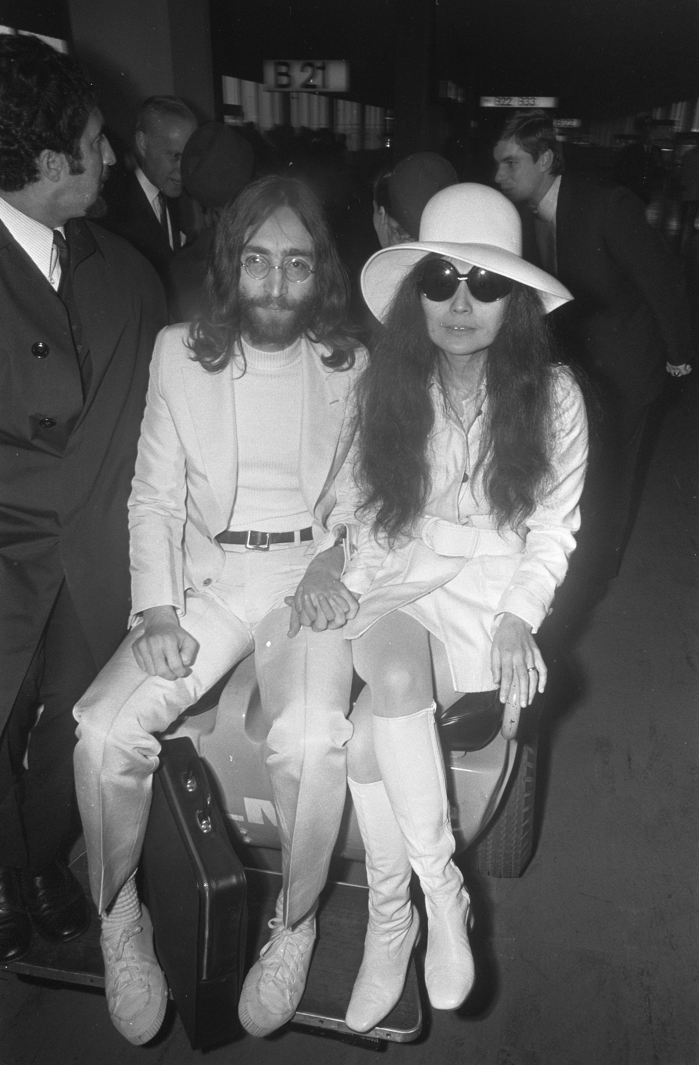 Collectie / Archief : Fotocollectie Anefo Reportage / Serie : [ onbekend ] Beschrijving : John Lennon en echtgenote Yoko Ono vertrekken van Schiphol naar Wenen in de vertrekhal, John Lennon en Yoko Ono op een KLM wagentje Datum : 31 maart 1969 Locatie : Noord-Holland, Schiphol Trefwoorden : aankomst en vertrek, aankomst- en vertrekhallen, echtparen, musici, vliegvelden Persoonsnaam : Lennon, John, Ono, Yoko Fotograaf : Evers, Joost / Anefo Auteursrechthebbende : Nationaal Archief Materiaalsoort : Negatief (zwart/wit) Nummer archiefinventaris : bekijk toegang 2.24.01.05 Bestanddeelnummer : 922-2494